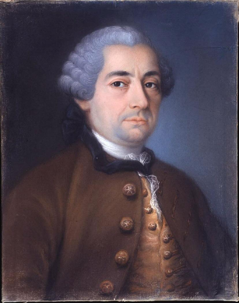 Retrato del arquitecto español Diego de Villanueva (1713-1774), que fue académico de la Real Academia de Bellas Artes de San Fernando y director de Arquitectura de la Academia.